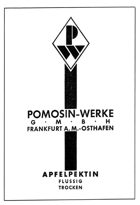 Logo Pomosin Werke